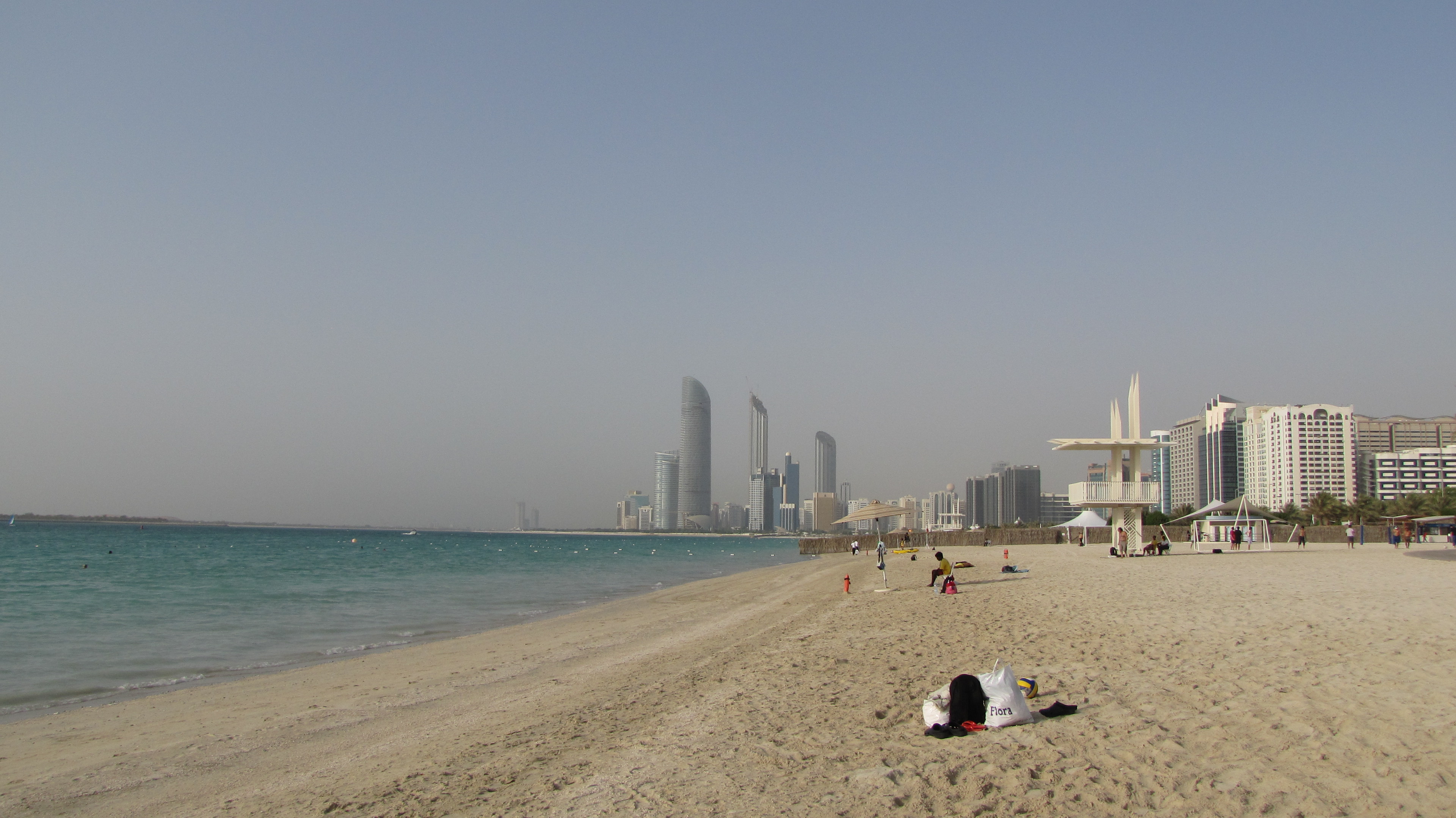 Strand von Abu Dhabi